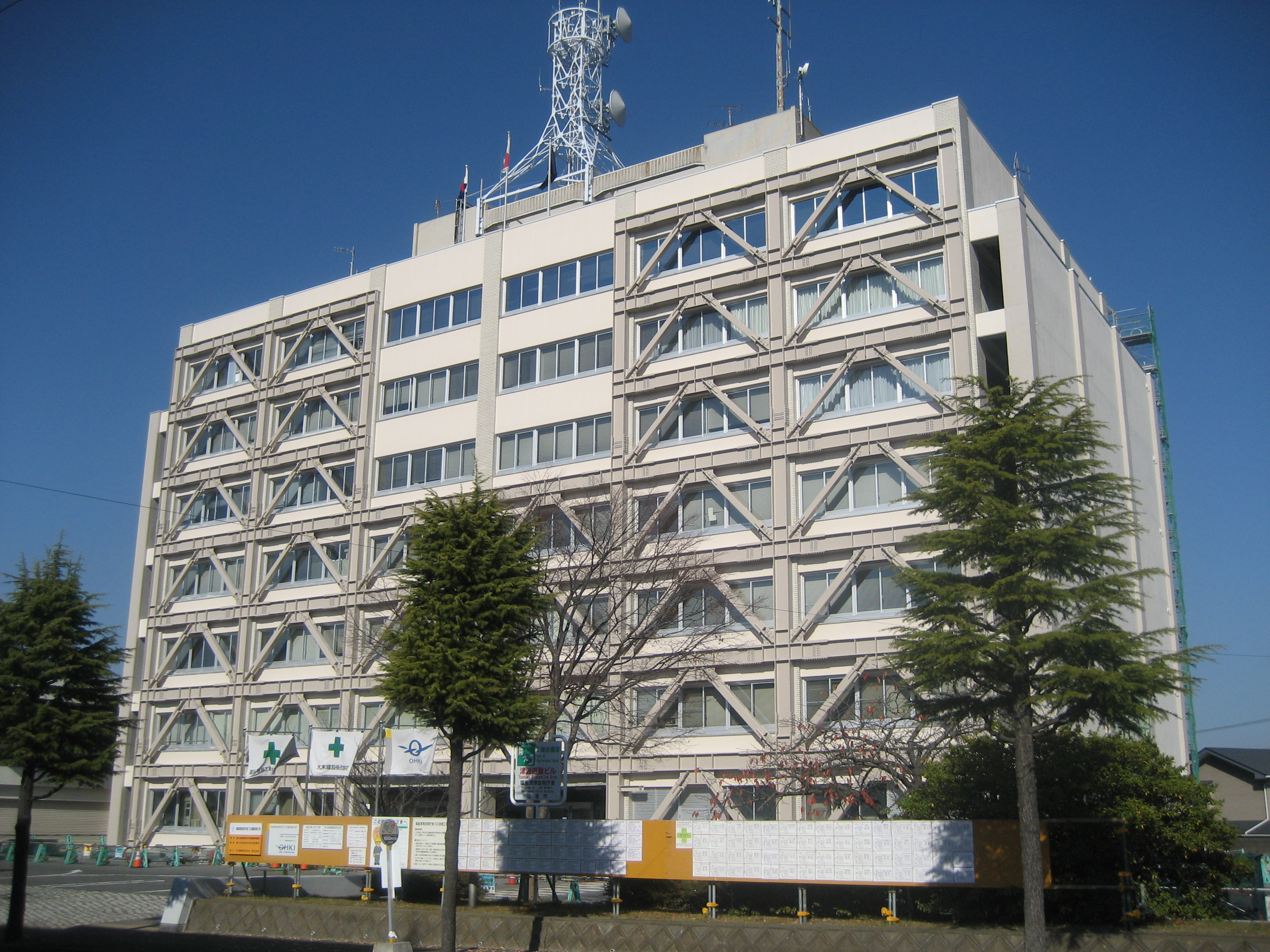 宮城県塩釜市にある塩釜港湾合同庁舎。 入居官署 財務省 横浜税関 仙台塩釜税関支署塩釜事務所 厚生労働省 仙台検疫所 農林水産省 横浜植物防疫所塩釜支所 国土交通省 海上保安庁 第二管区海上保安本部 宮城海上保安部